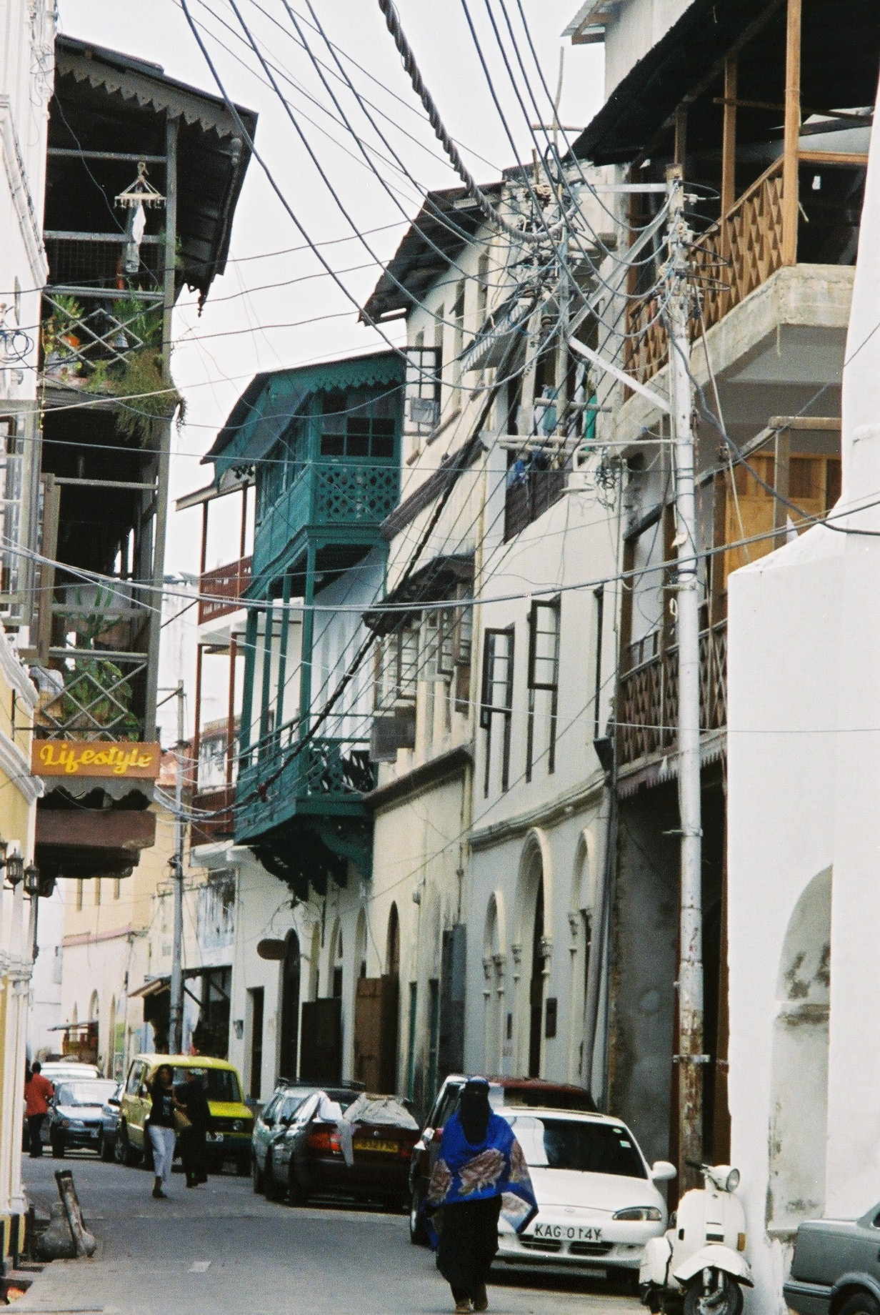 Kenya - Mombasa - Sir Mbarak Hinawy Road dans l'ancienne ville